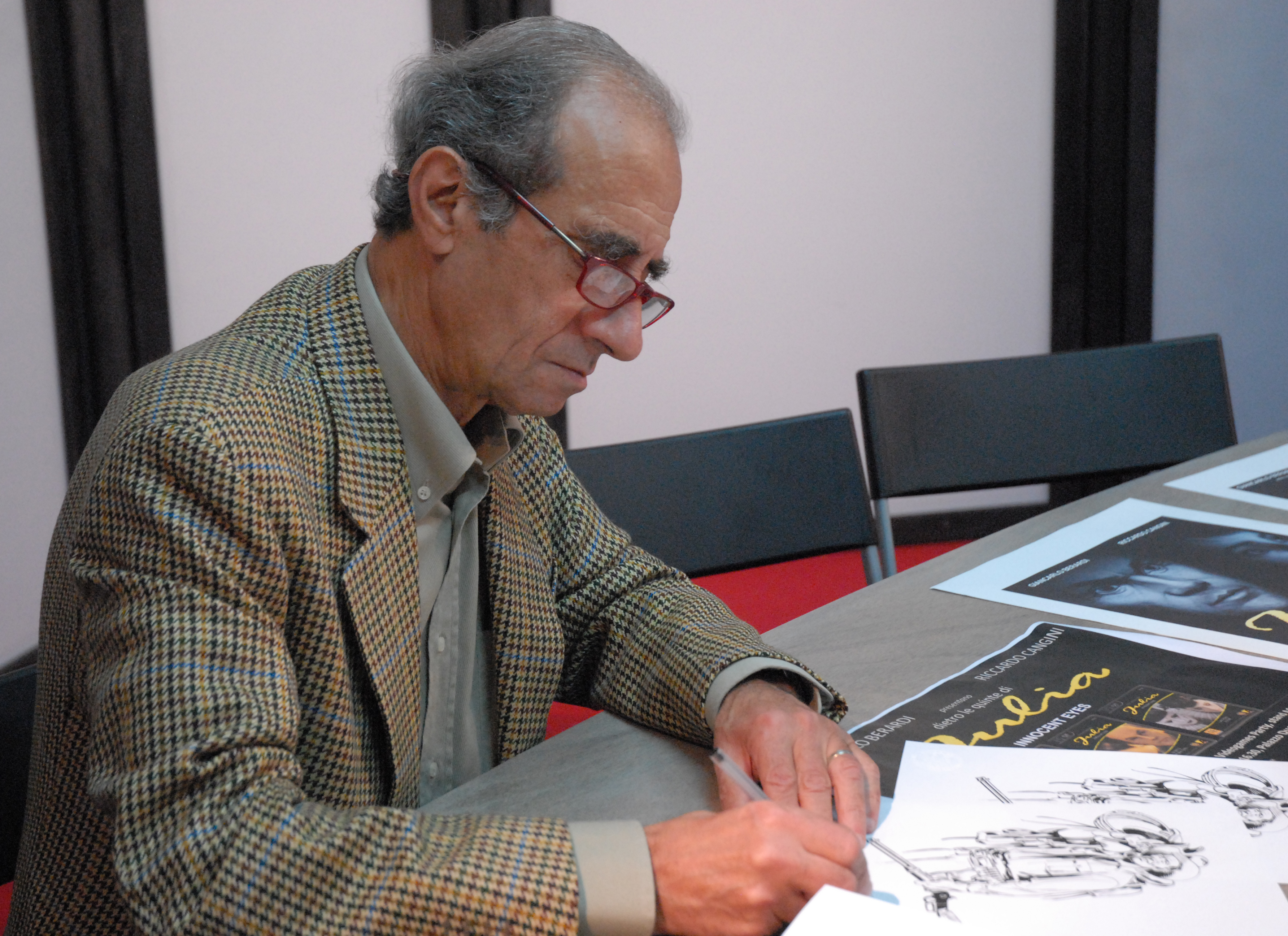 Giovanni Ticci Photo taken during Lucca Comics&Games 2010